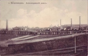 Александровский пушечно-литейный завод. Фото начало 20 века